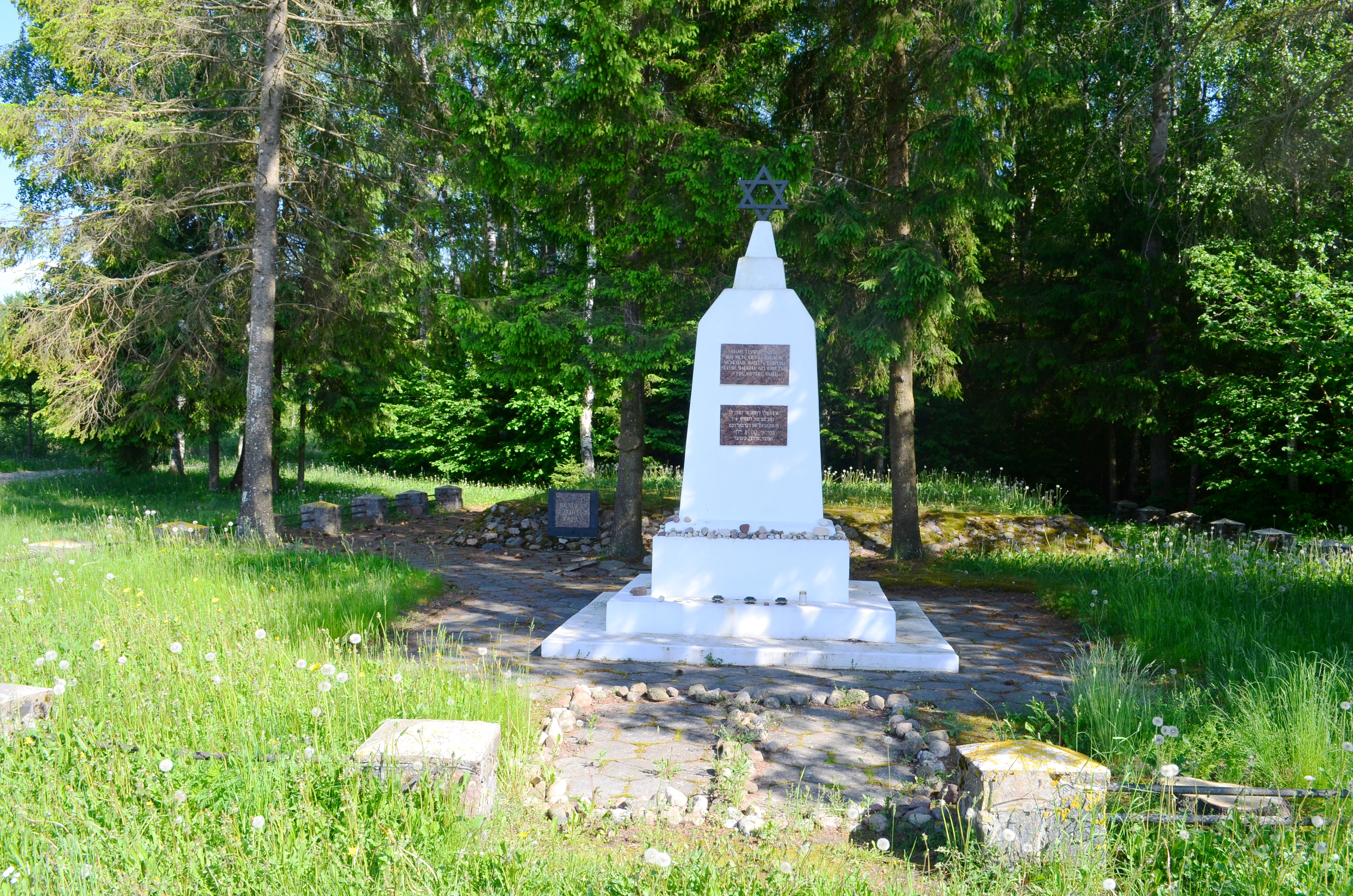 Žydų žudynių vieta Norutaičiuose, Šiaulių raj.